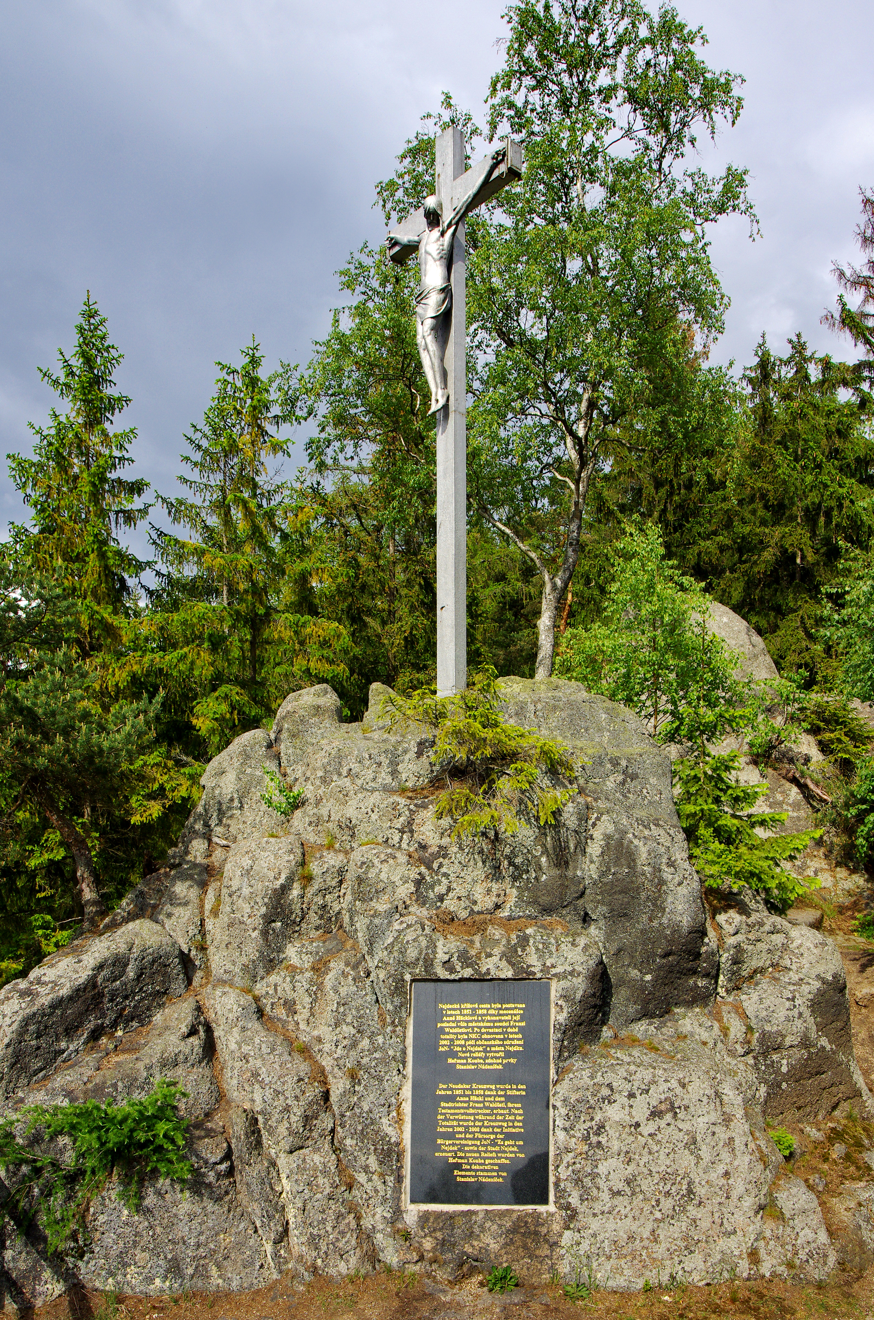 Nejdek, Křížová cesta na Křížový vrch (686 m), kříž na vrcholu Křížové cesty, Krušné hory